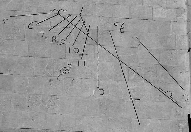 Meridiana posta sulla facciata della chiesa di San Vito in L'Aquila